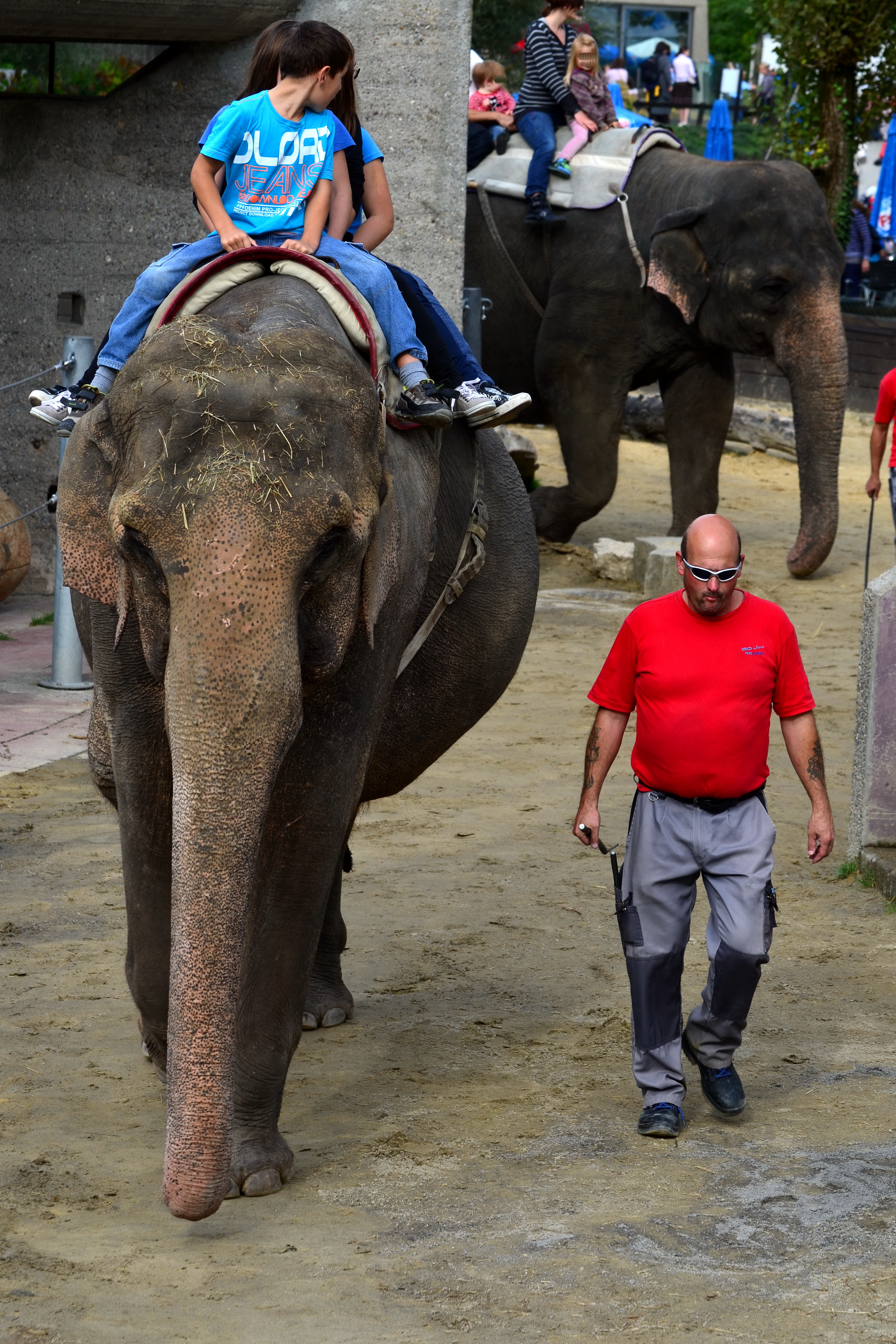 Knie's Kinderzoo in Rapperswil (Switzerland)